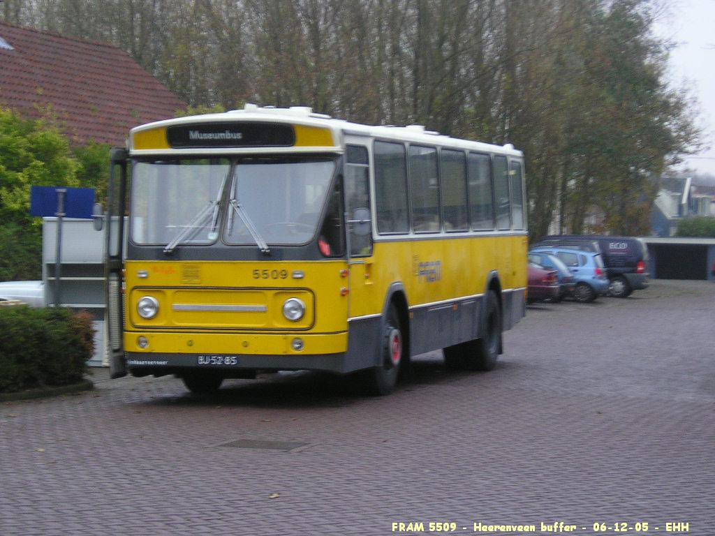 Leyland / Den Oudsten (FRAM 5509) in Heerenveen, Netherlands.